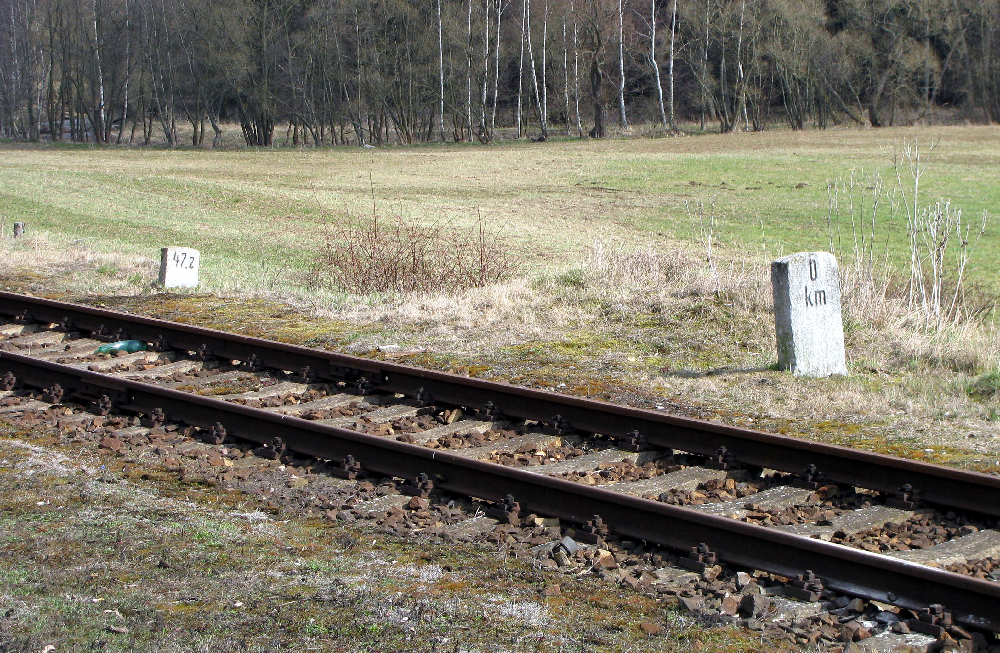 Počátek staničení trati Protivec - Bochov v dopravně Protivec